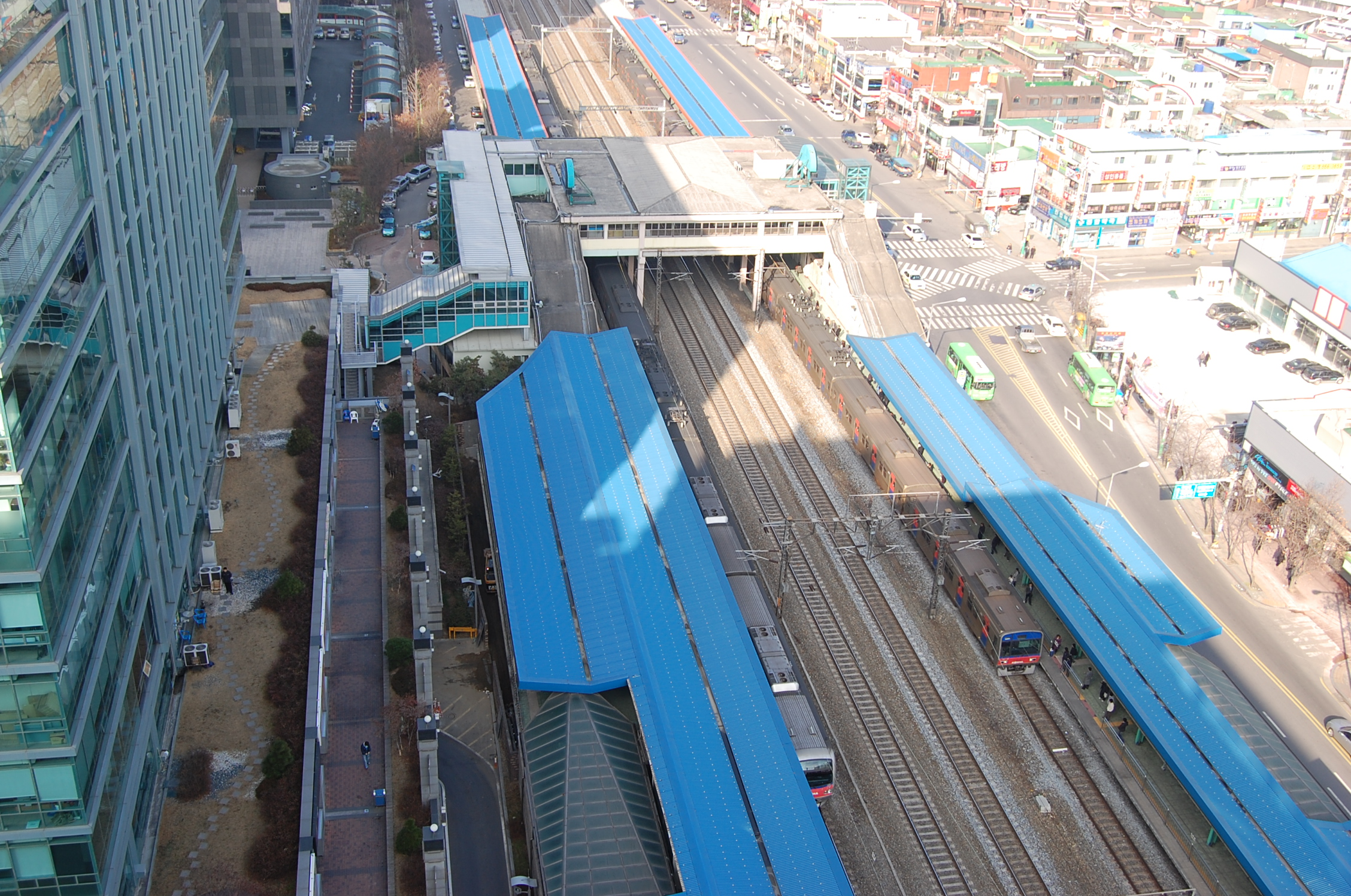 ビルの上から眺めた加山デジタル団地駅全景。12月14日利用者:WaffenSS撮影。